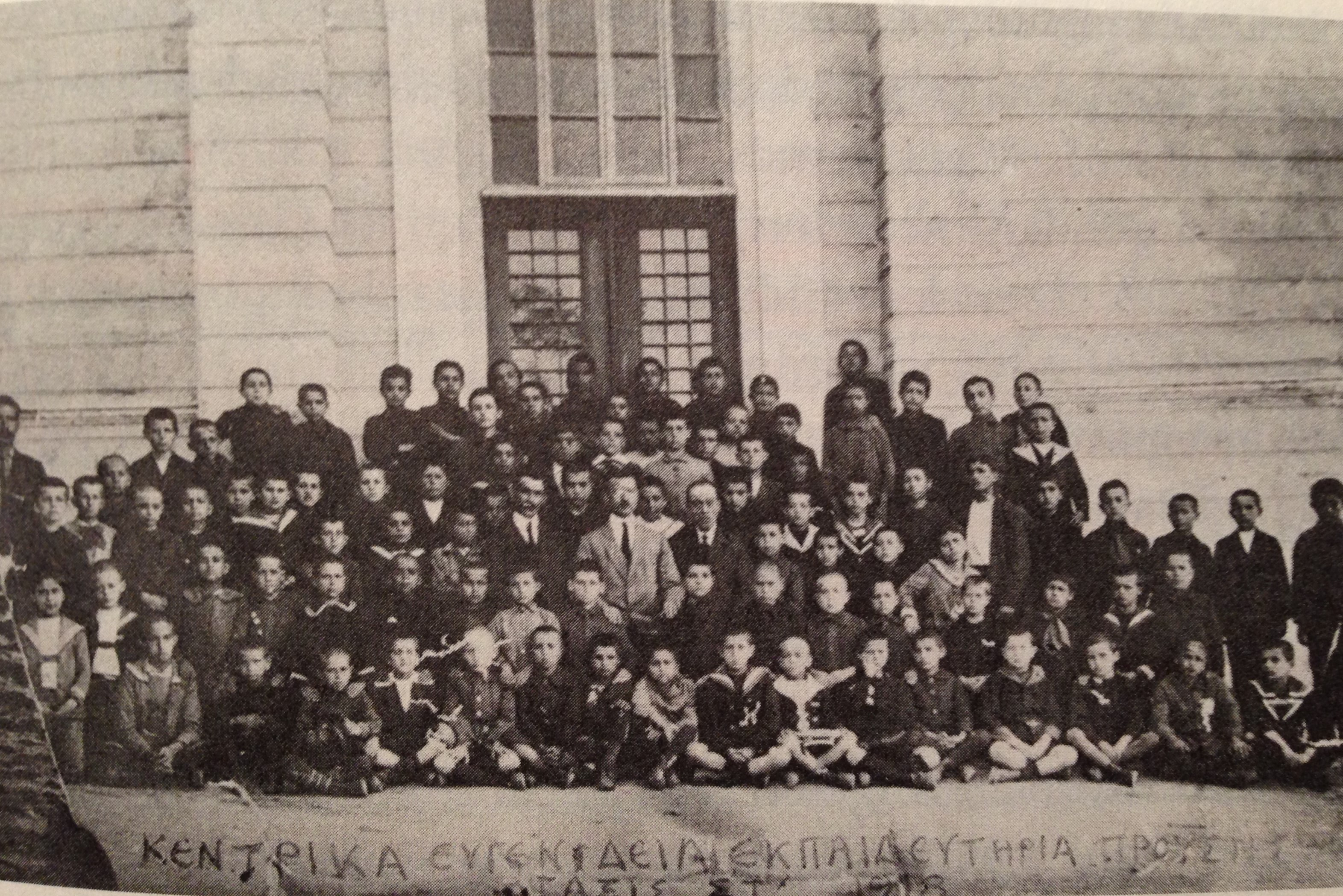 bursada rum okulu